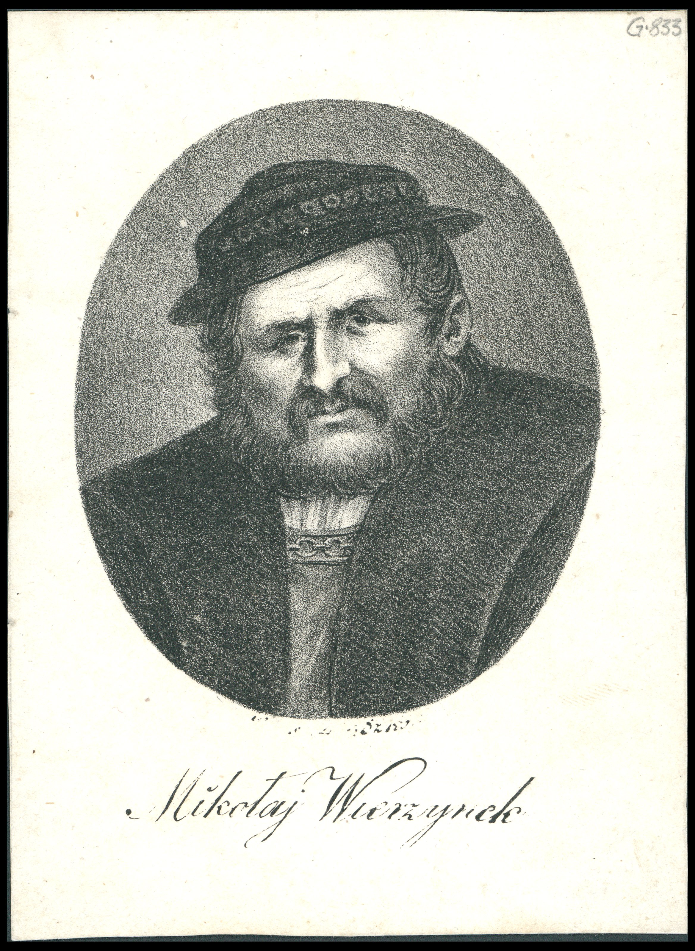 Mikołaj Wierzynek młodszy